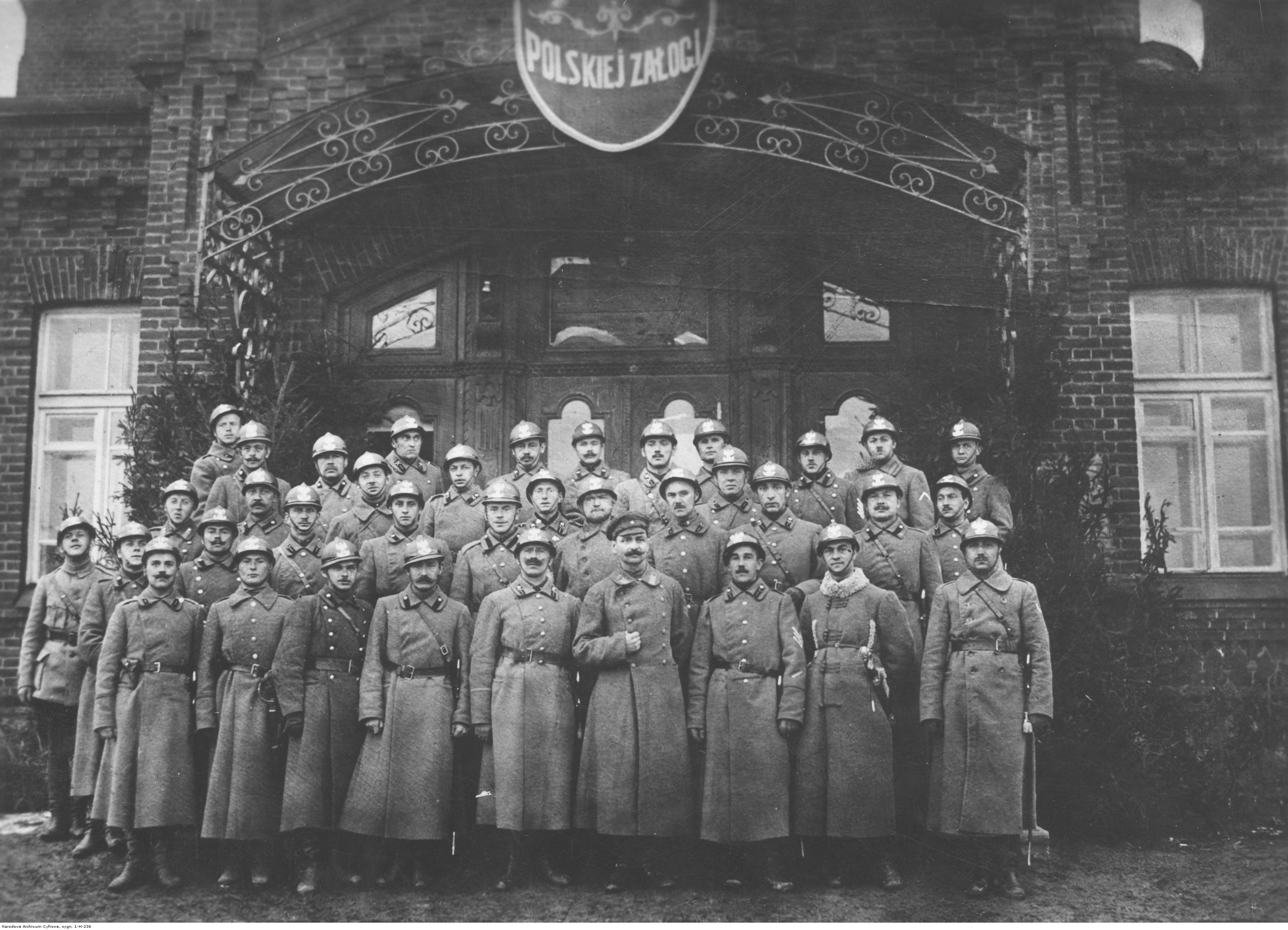 I Korpus Polski w Rosji - grupa oficerów 1 pułku inżynierii przed jednym z budynków twierdzy Bobrujsk; 1918 r. W pierwszym rzędzie (czwarty z prawej) stoi pułkownik Bolesław Jaźwiński. Koncern Ilustrowany Kurier Codzienny - Archiwum Ilustracji. Sygnatura: 1-H-236